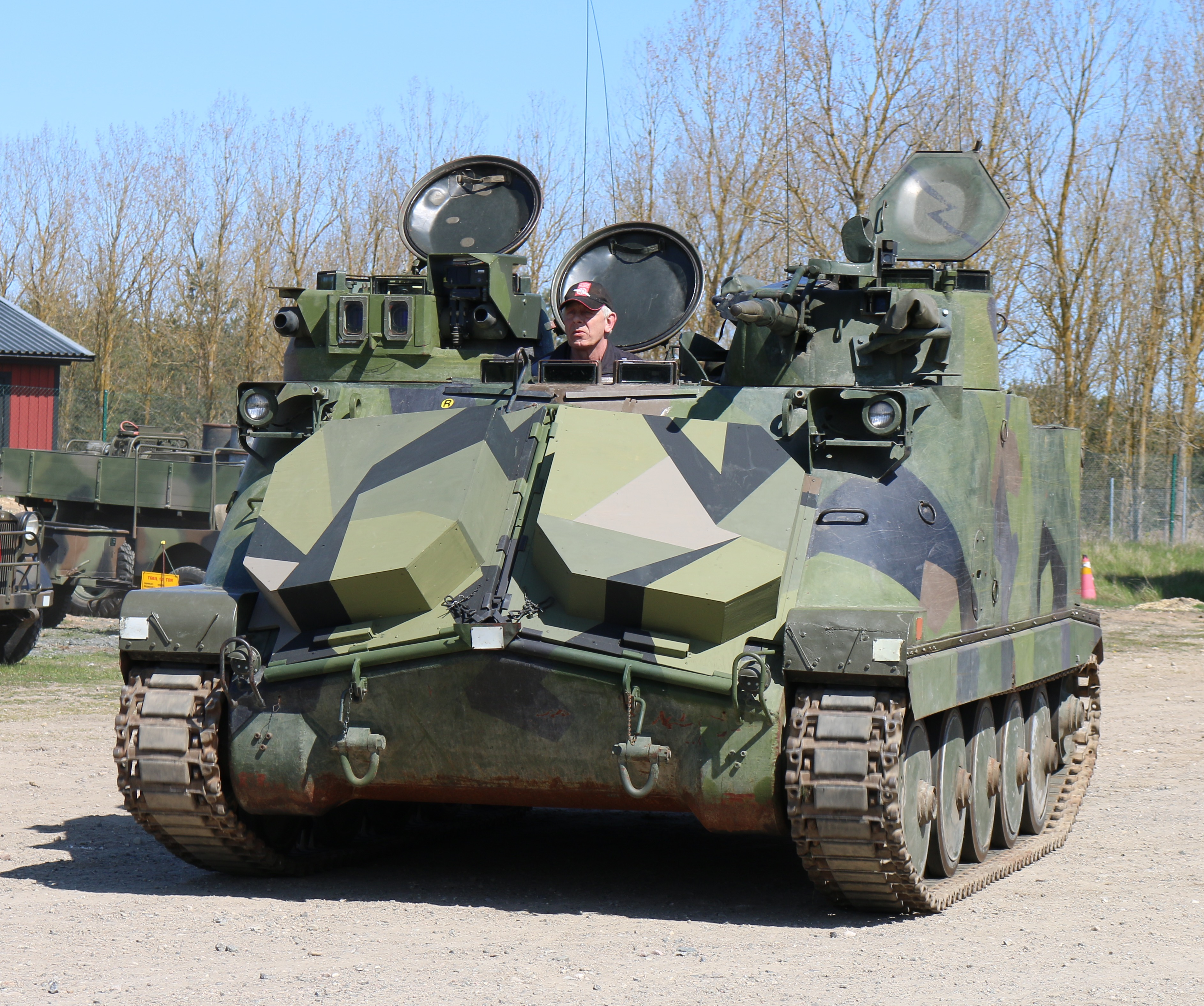 Pansarbandvagn 302 Artillerimuseet 2017-2